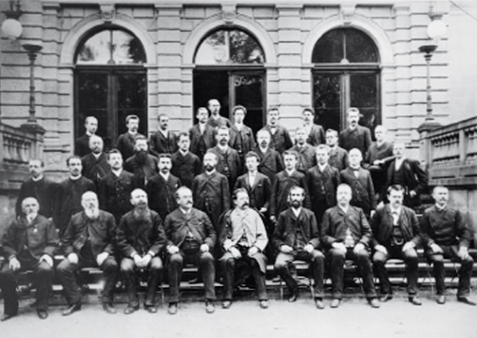 Älteste Aufnahme des Kurorchesters Bad Kissingen vor dem Luitpoldbad (heute: Bayer. Spielbank). In der ersten Reihe Erster von links ist Josef Kliegl (69), Sohn des Gründungskapellmeisters Johann Kliegl.